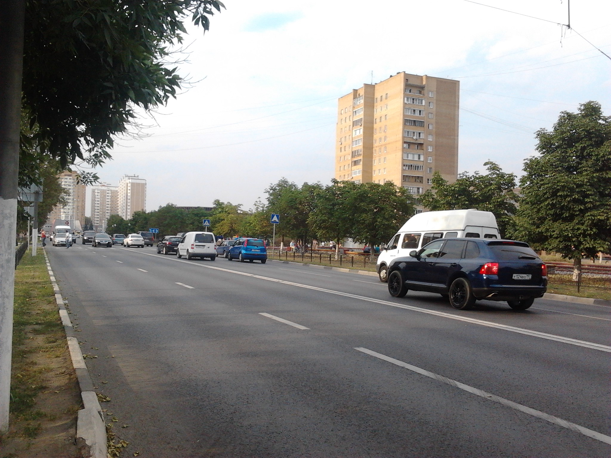 Железка 1 августа 2014 г.